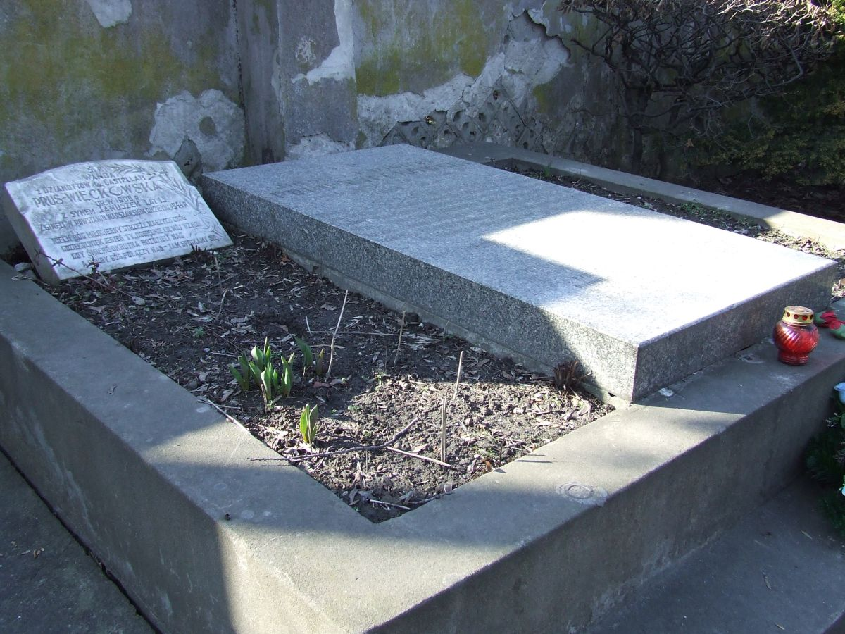 Cmentarz Powstańców Warszawy, grób gen. Mikołaja Prusa-Więckowskiego, jego żony i syna zabitych w Powstaniu Warszawskim